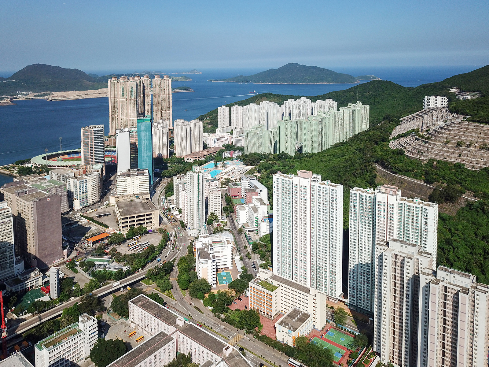 Siu Sai Wan